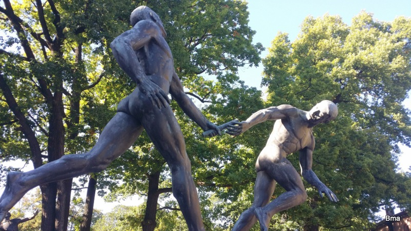 Stafettlöpare (1939) - Carl Fagerberg (1878-1948) It is not clear whether freedom of panorama applies to this image. This is a depiction of a work of art in Sweden. The depicted work is believed to be protected by copyright. According to Article 24 of the Swedish copyright act, "Works of art may be depicted if they are permanently placed on or at a public place outdoors. Buildings may be freely depicted." It has been widely accepted that this provision made distribution of depictions such as this one legal. On 4 April 2016, however, the Supreme Court of Sweden issued a statement that Article 24 does not extend to publication in online repositories, and on 6 July 2017, a lower court ruled that linking to depictions of copyrighted artworks hosted on Commons constitutes copyright infringement. See Commons:Freedom of panorama#Sweden for more information. The implications of these decisions on Commons' ability to continue to distribute this and other depictions like it are currently under analysis. Reusing or linking to this file may have legal consequences. You are solely responsible for ensuring that you do not infringe the copyright belonging to someone else. See our general disclaimer for more information.